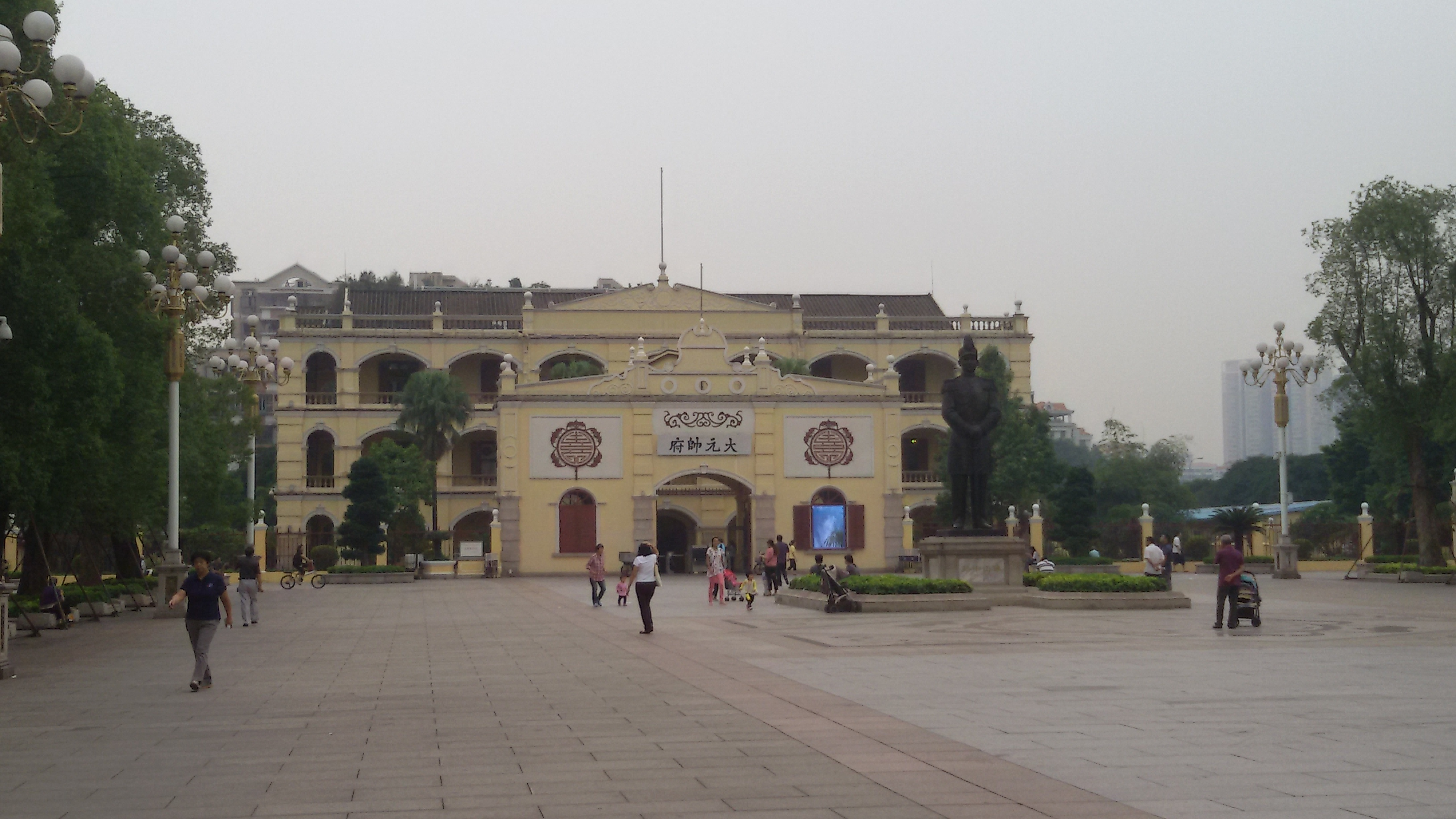 粵語: 大元帥府（2014年10月24號）